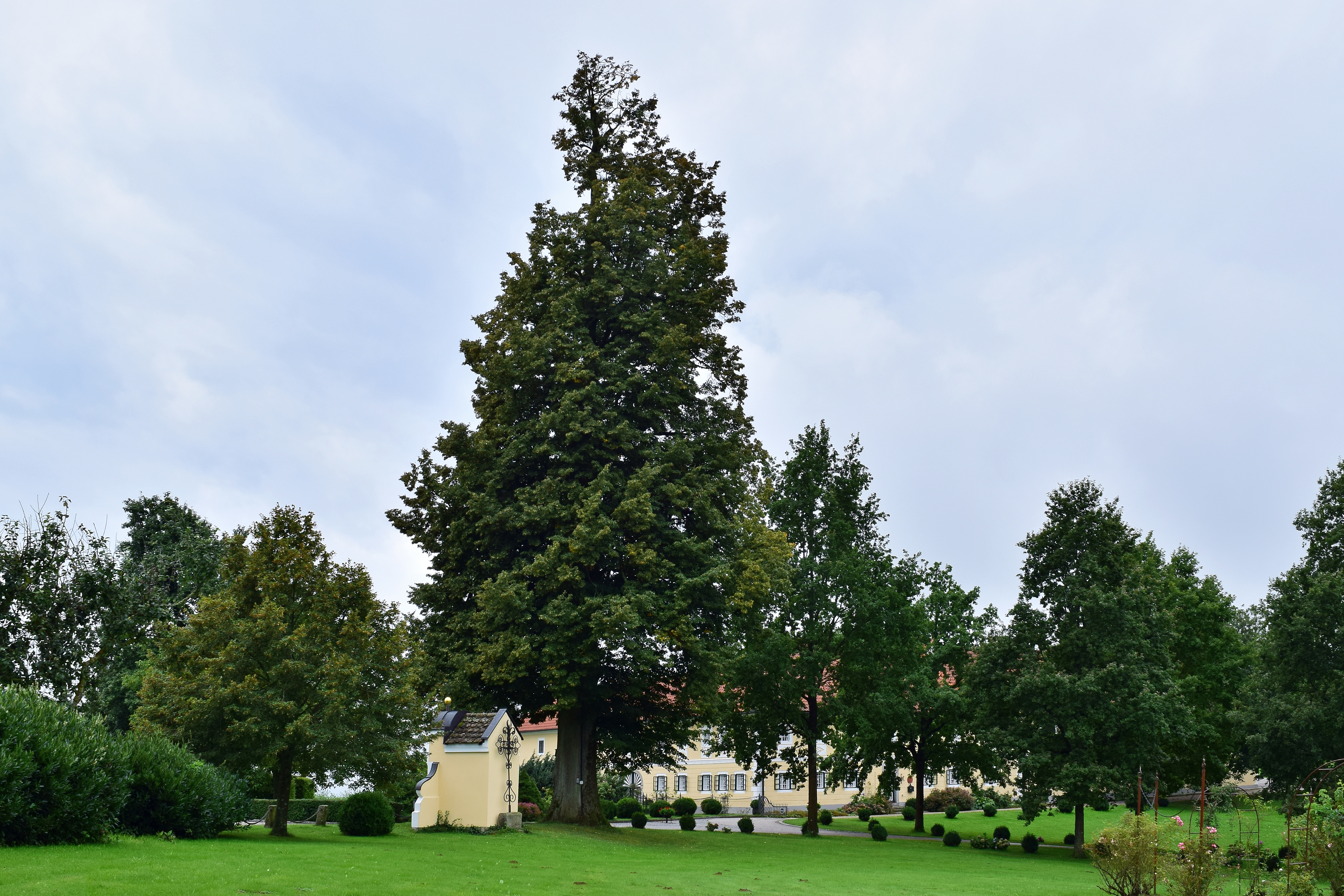 Fadinger Linde This media shows the natural monument in Upper Austria with the ID nd233.